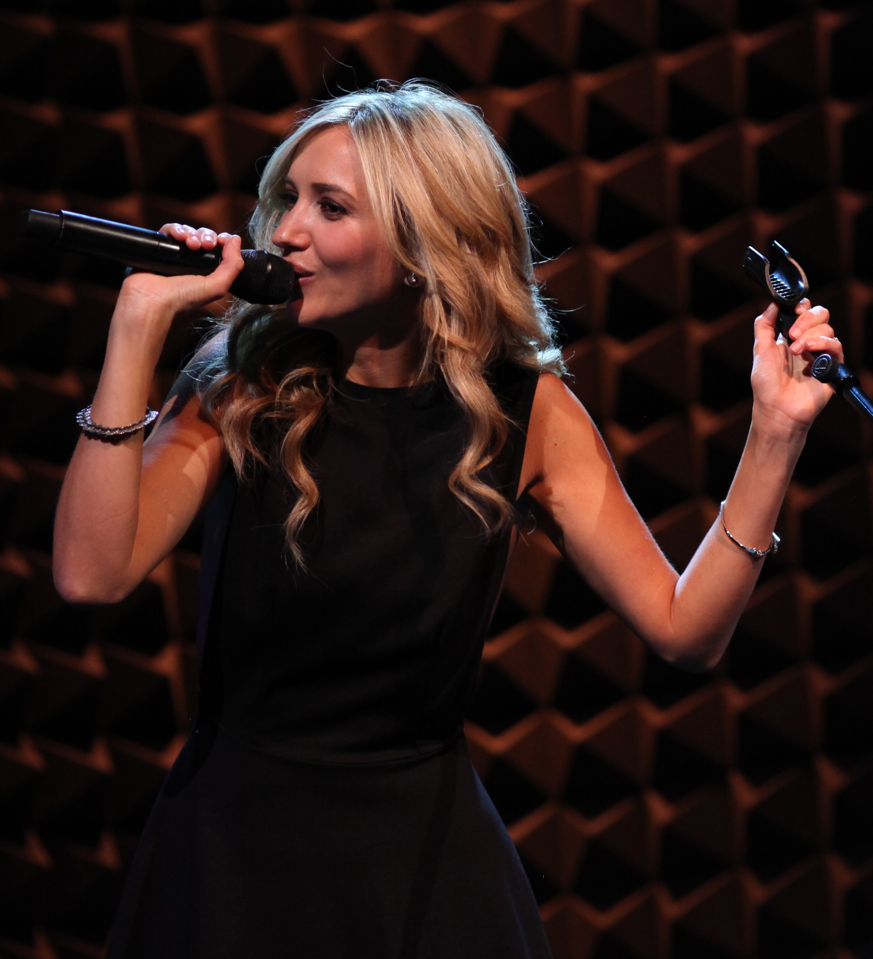 Sarah Darling at Joe's Pub, August 26, 2014. Sarah Darling at Joe's Pub, August 26, 2014.